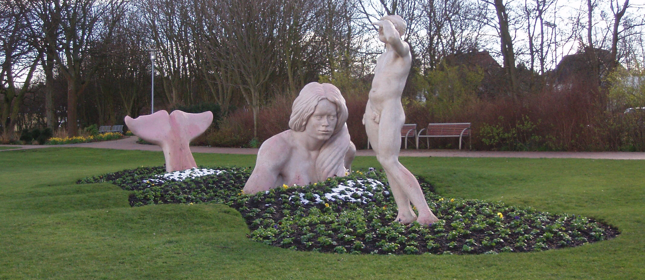 Kunstwerk von Martin Wolke im Kurpark von Eckernförde